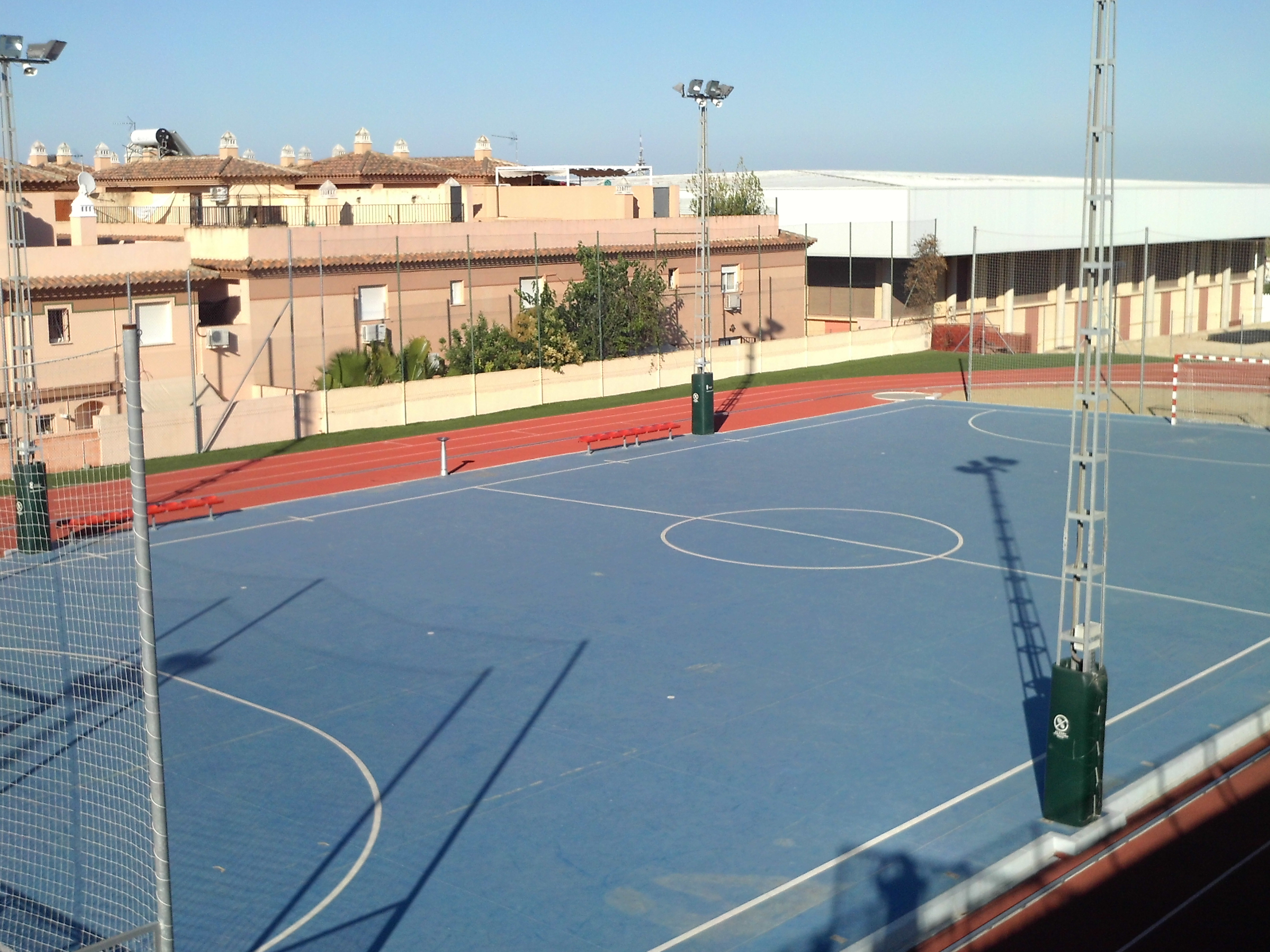 Campo de fútbol. Polideportivo de Mascareta. Tomares, provincia de Sevilla, Andalucía, España.